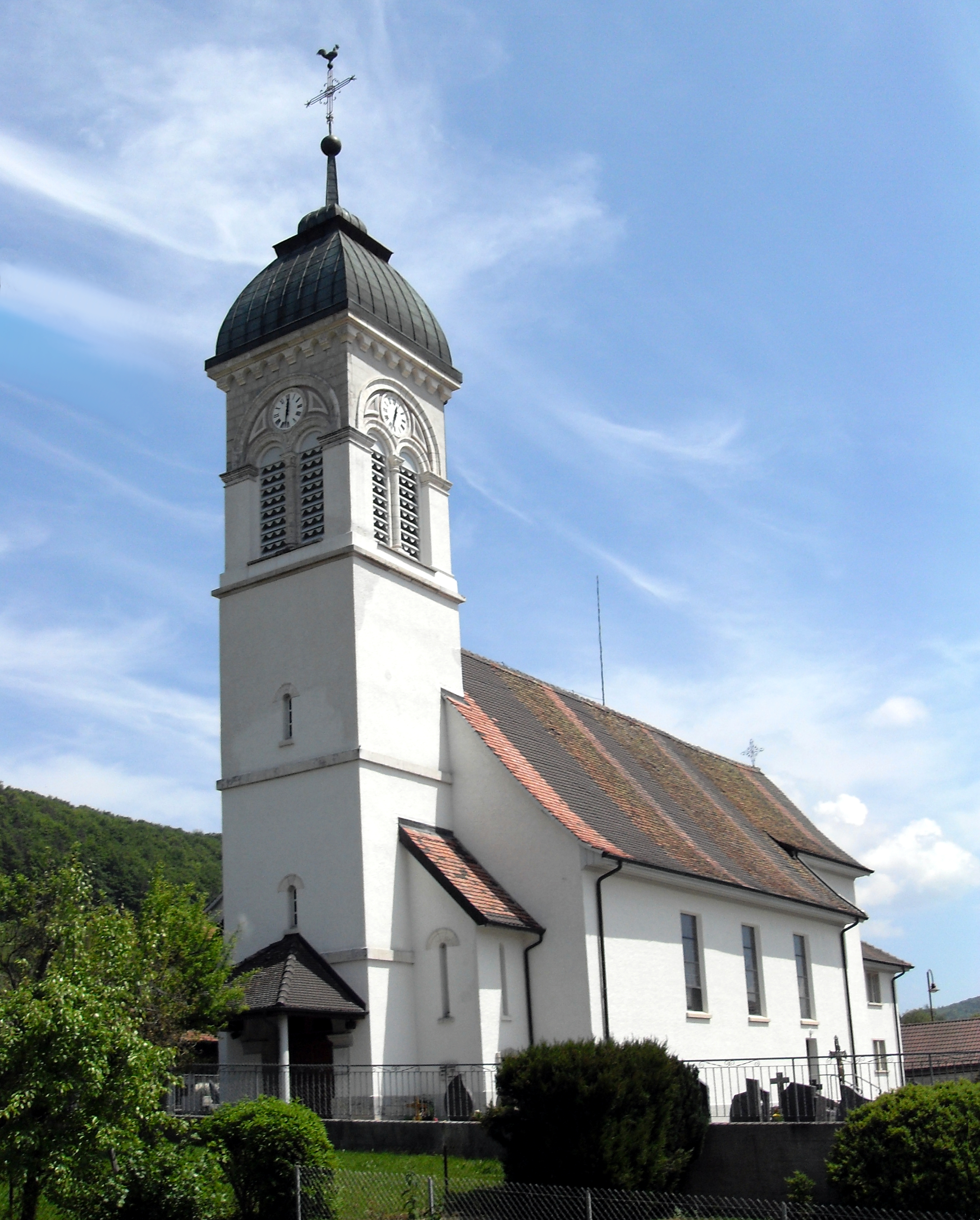 L'église paroissiale de Movelier, Suisse